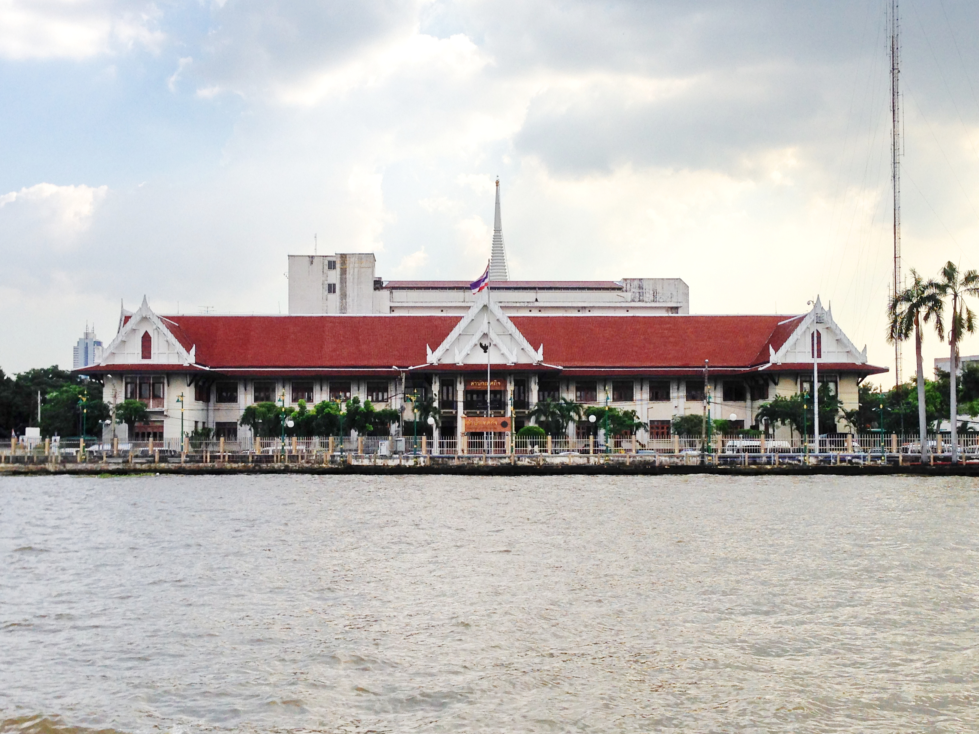 Thetsaban Sai 1, Wat kanlaya, Thon buri, bangkok, Thailand